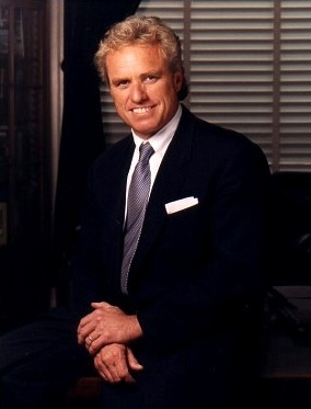 Joe Kennedy II - USA